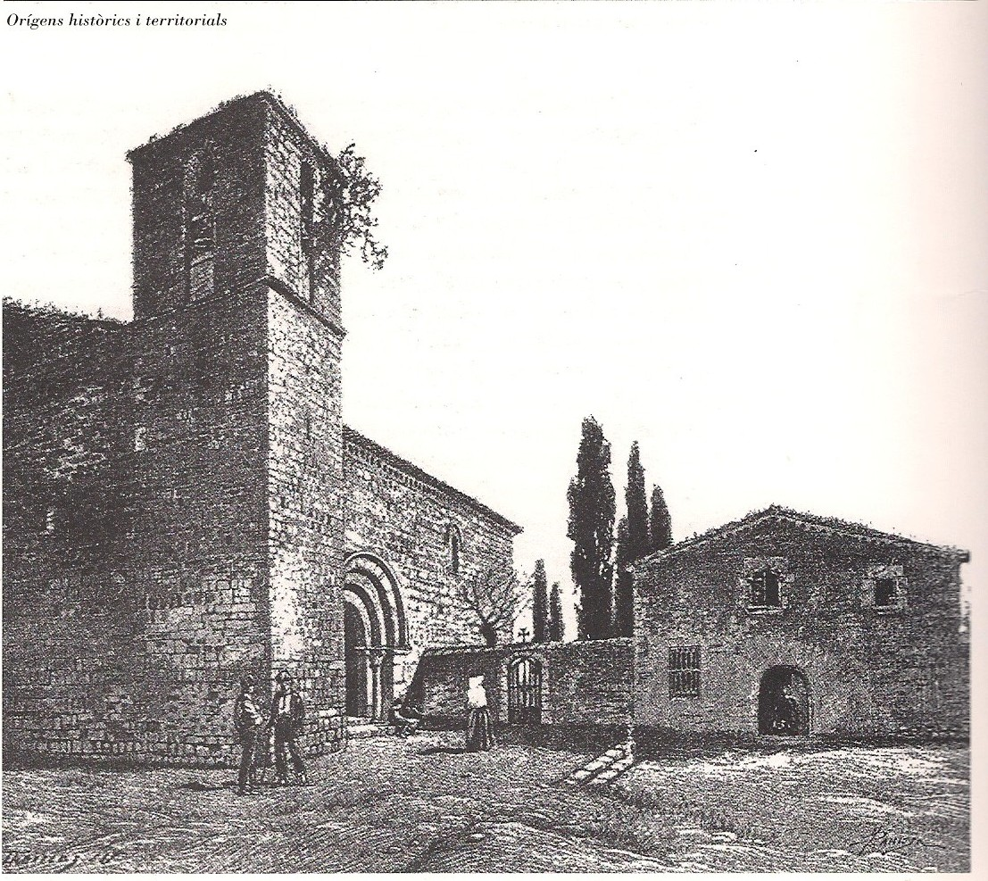 L'església romànica de Santa Maria de Sants dibuixada pel paisatgista santsenc Jaume Pahissa, el 1890.